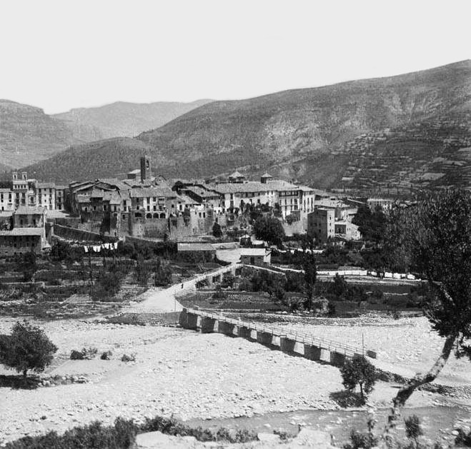 Imatge